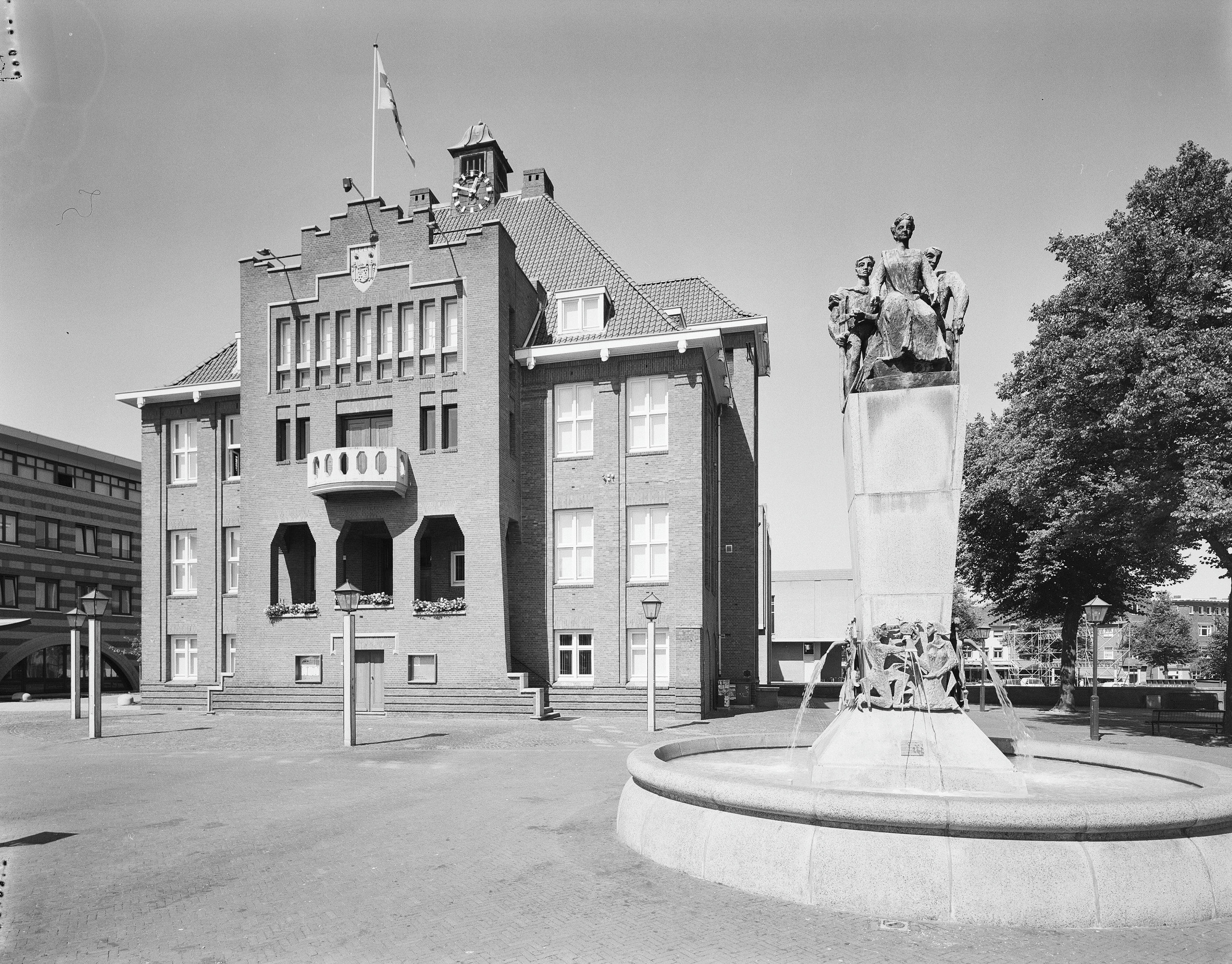 Raadhuis: Overzicht voorgevel met fontein als Wilhelminamonument op de voorgrond (opmerking: Gefotografeerd voor Monumenten In Nederland Limburg)